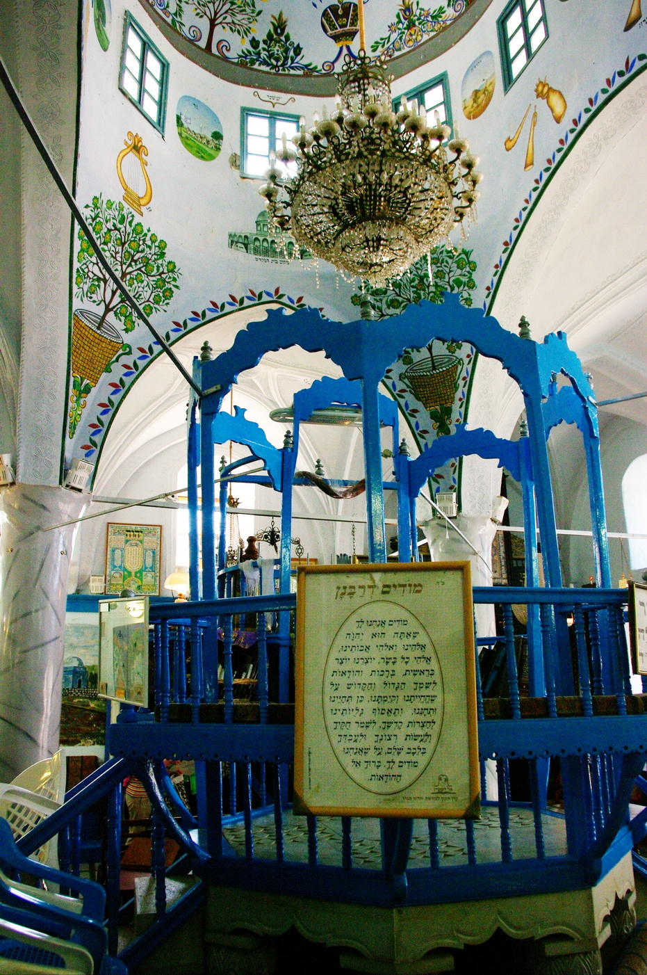 Synagoge Safed, Kanzel